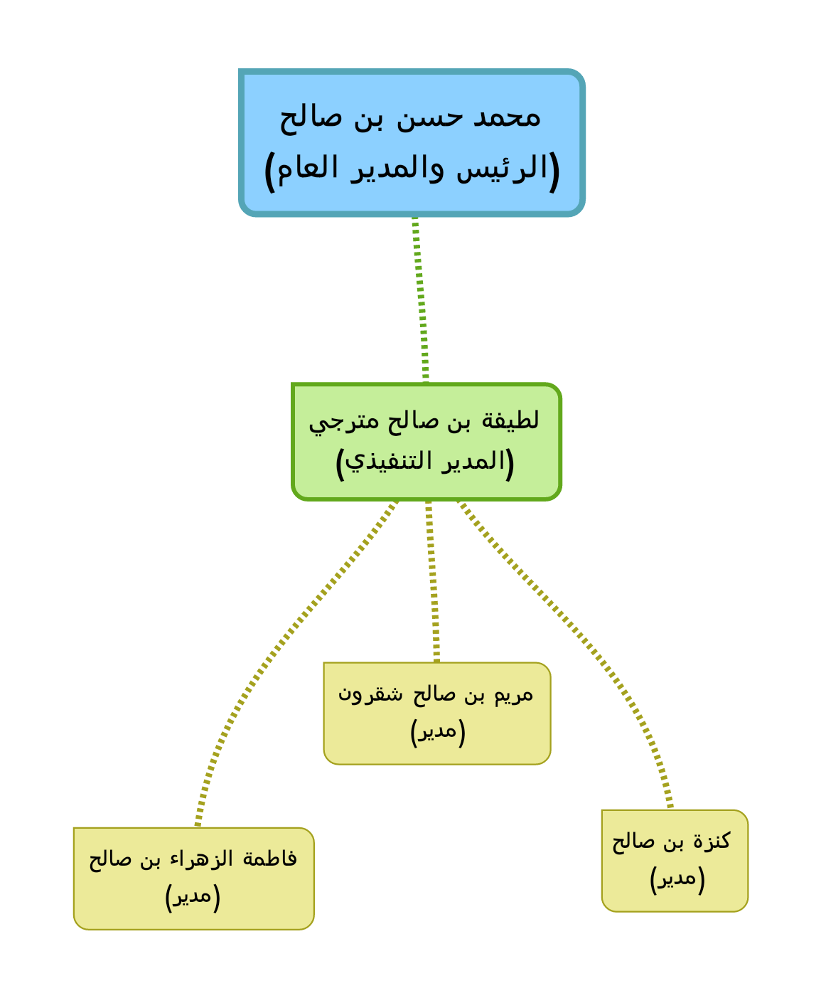 الهيئة التنظيممية لمجموعة هولماكروم